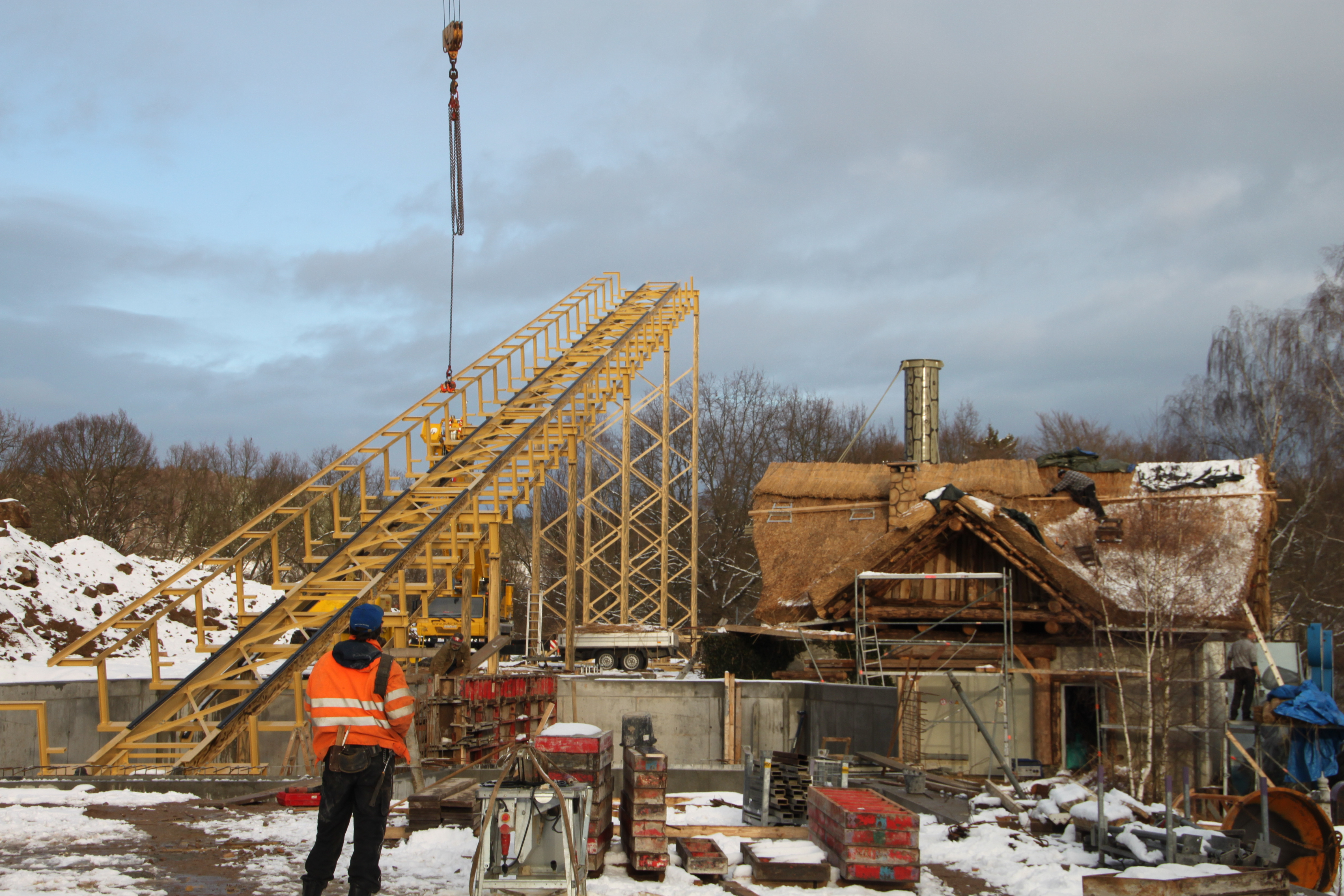 Fluch des Teutates während des Aufbaus im Februar 2013